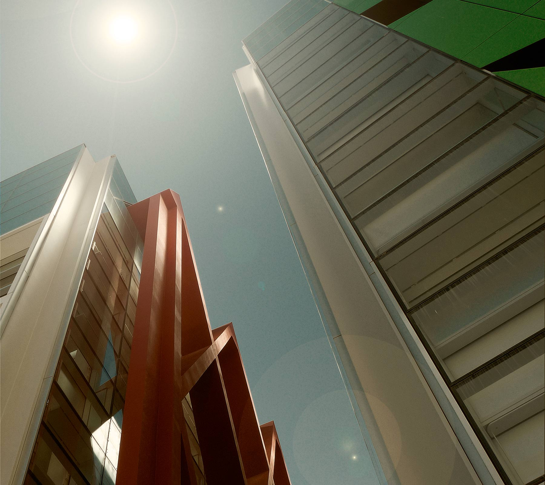 Museo de la Evolución Humana de Burgos